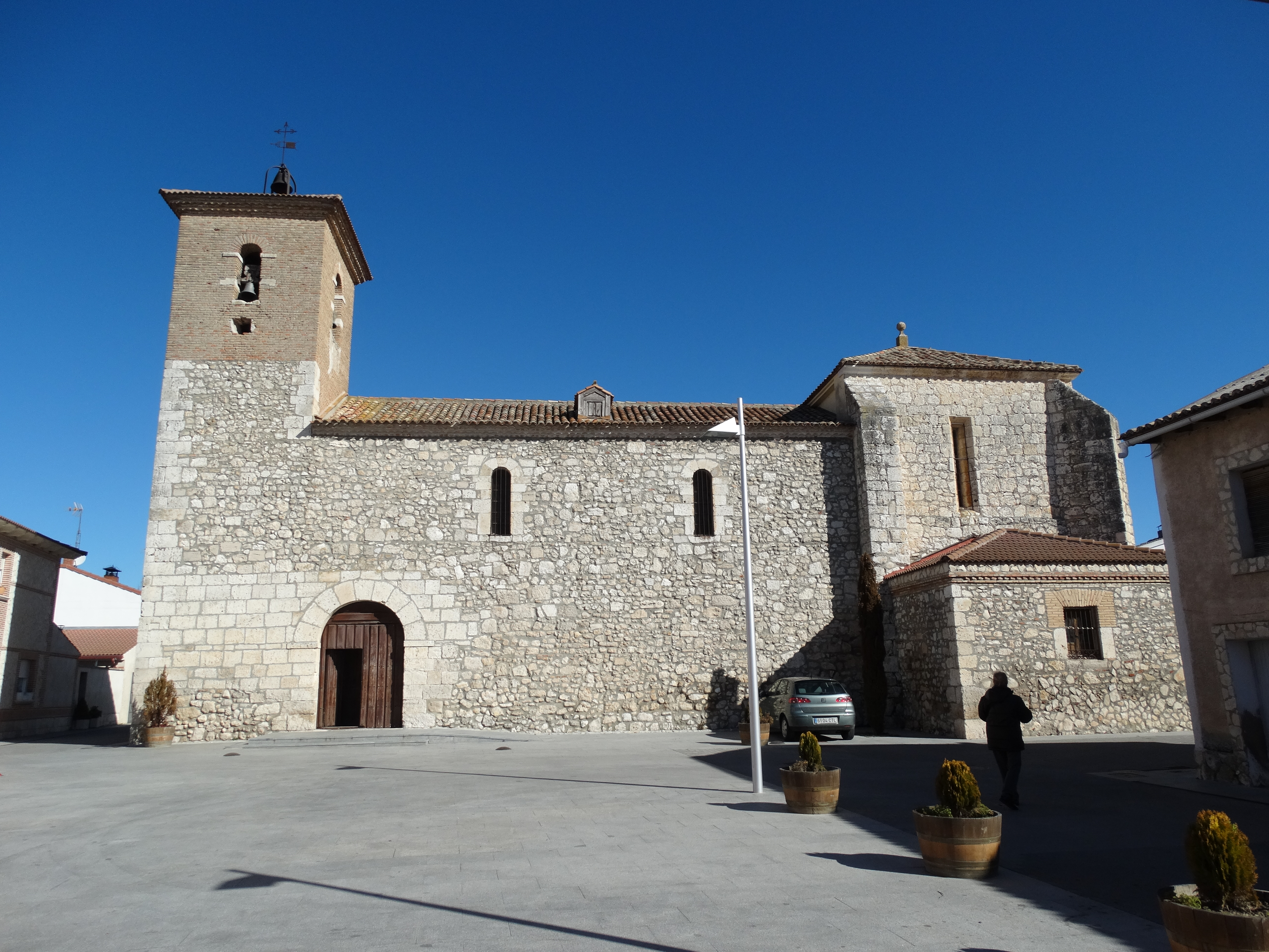 Sardón de Duero, Valladolid, España. Iglesia de San Juan Bautista.